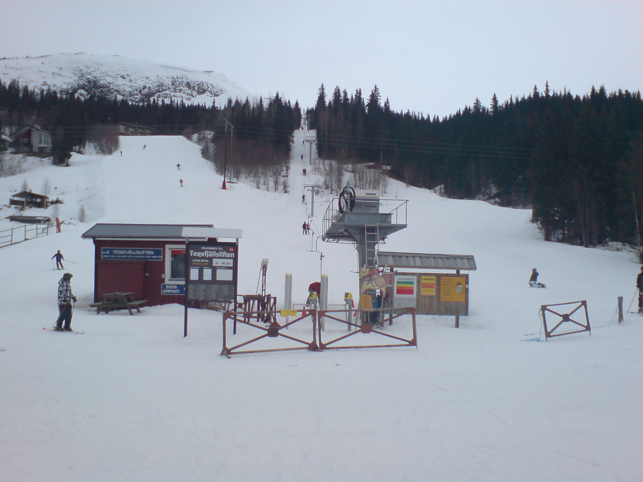 Tegefjällsliften